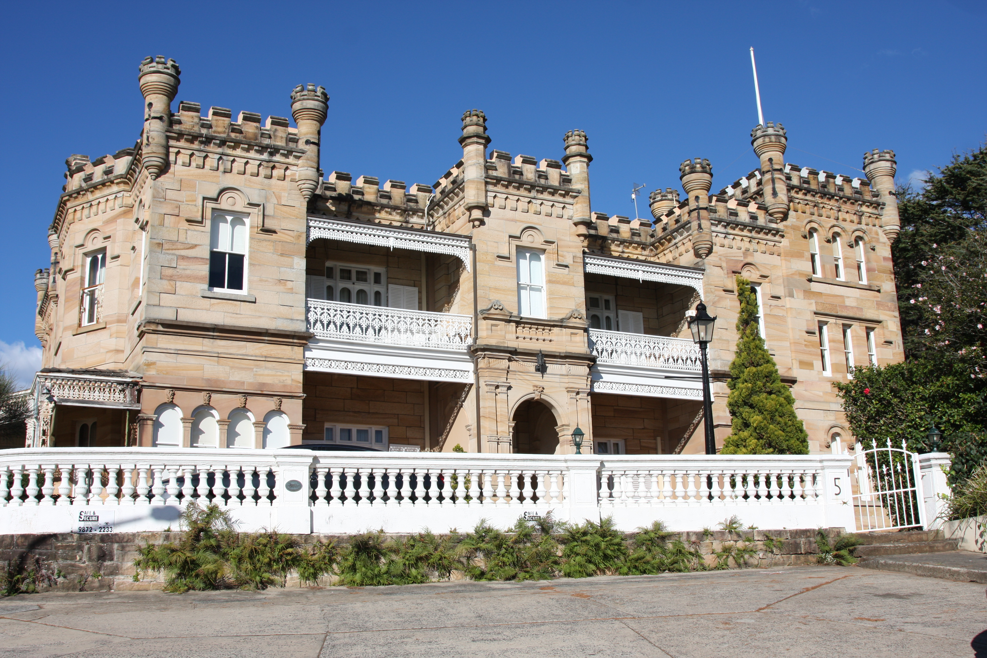 Fernleigh Castle, Fernleigh Gardens